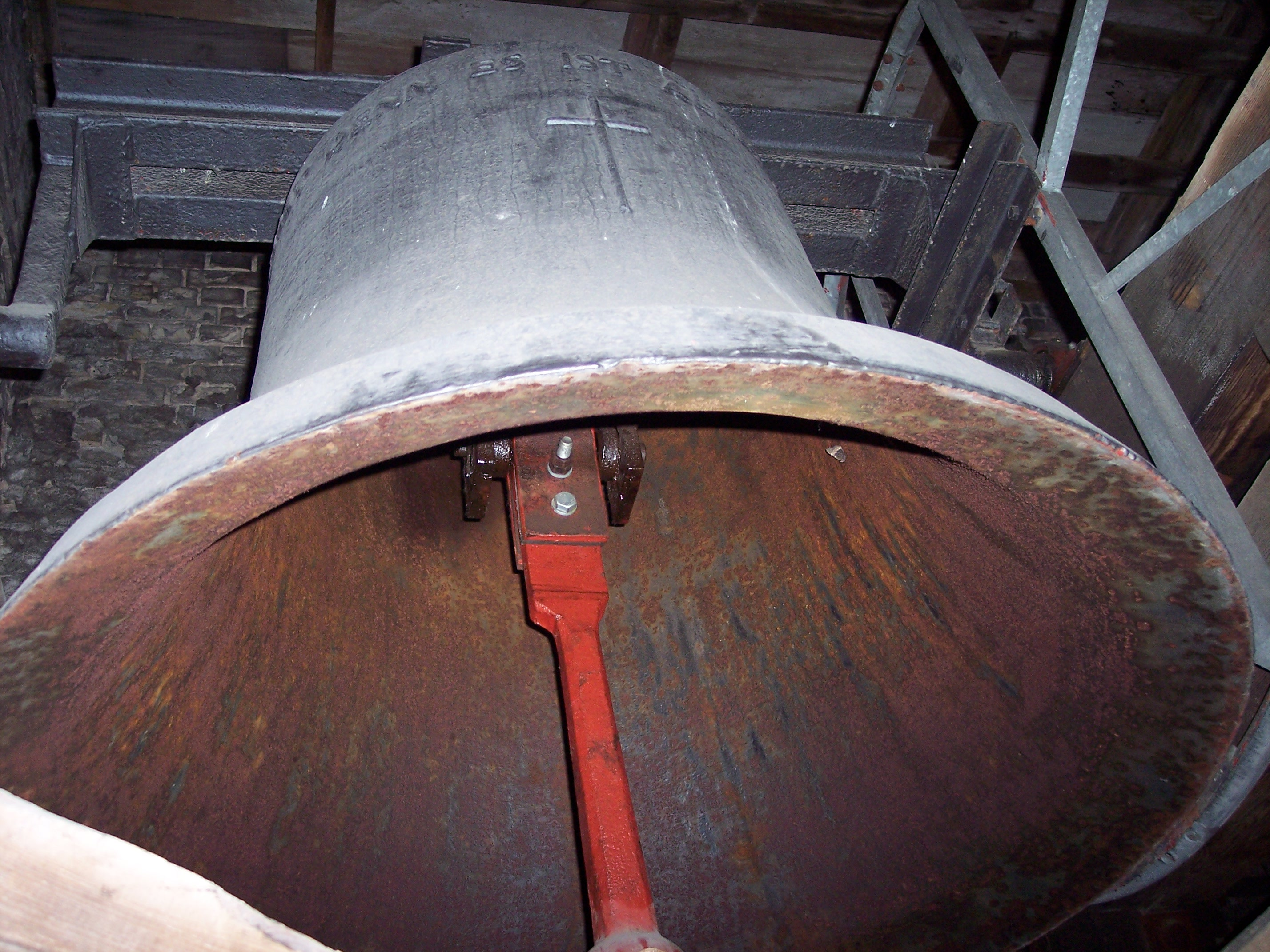 Die große Glocke der Dorfkirche (Berlin-Marzahn)